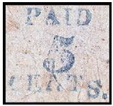 Почтовая марка США, BOSCAWEN, N. H. Scott №4X1